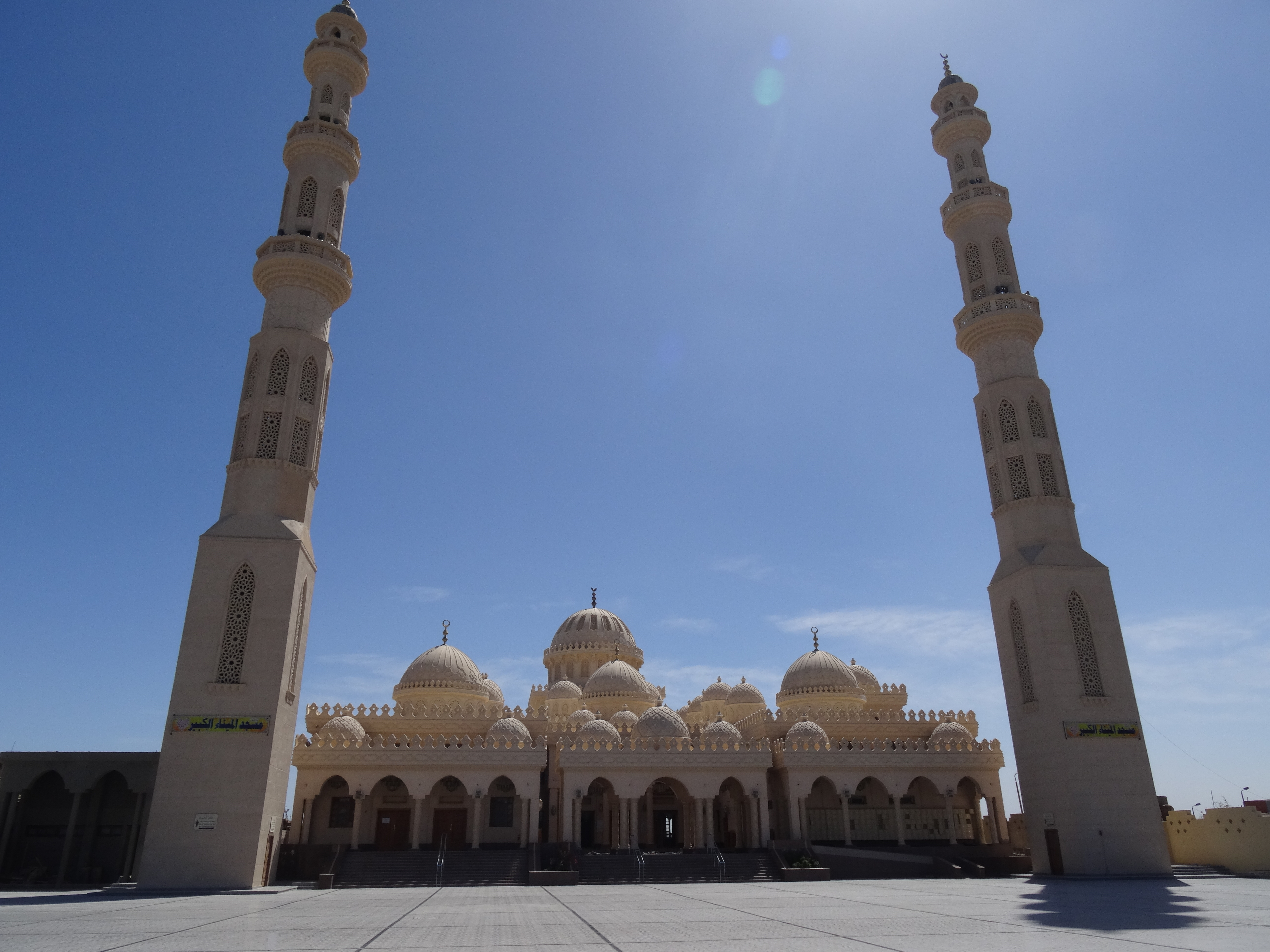 Mosque El Mina Masjid, Hurghada